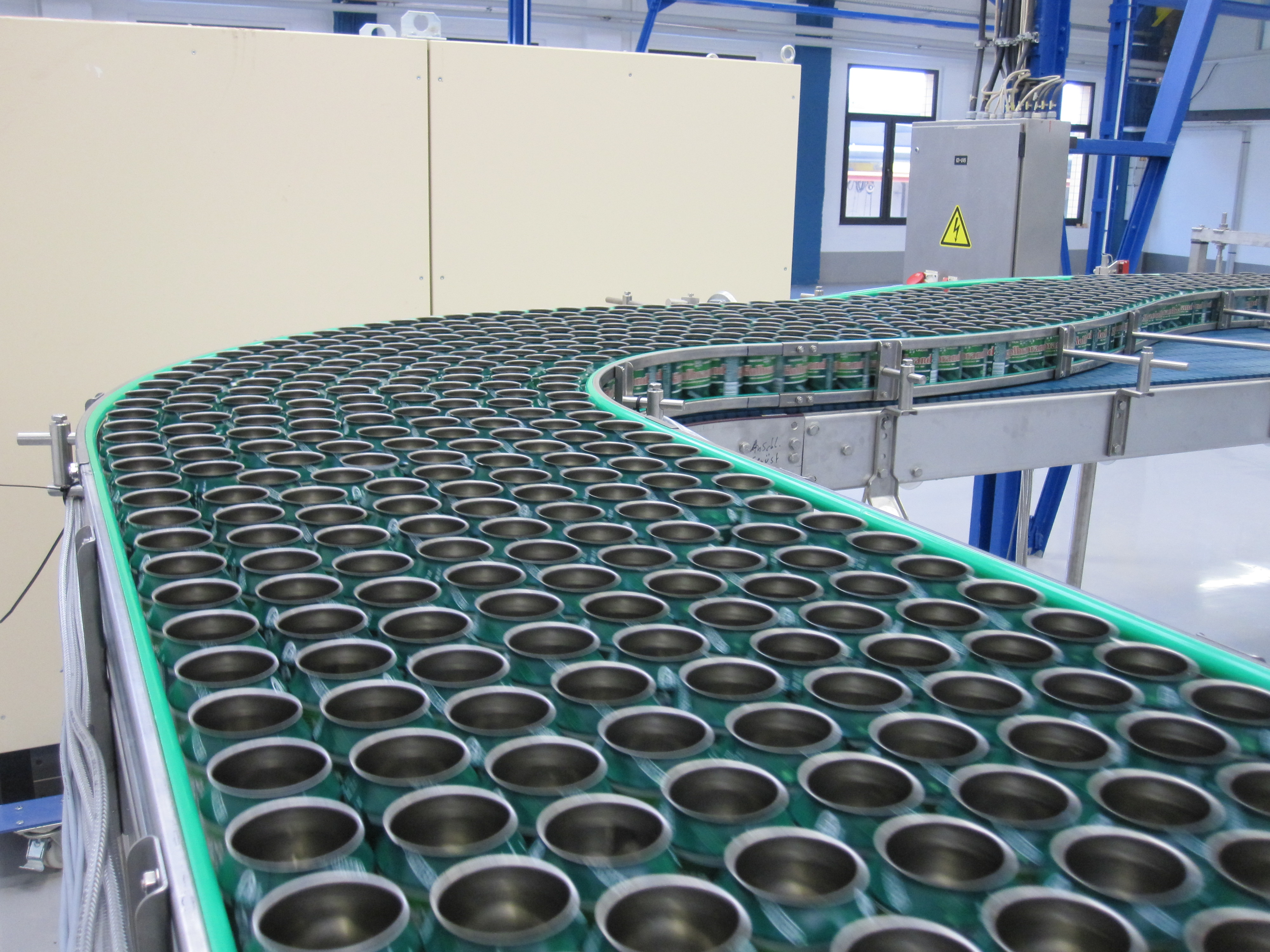 Bierdosen in einer Abfüllanlage auf dem Transporteur vor der Befüllung. Dosen sind noch ohne Deckel.